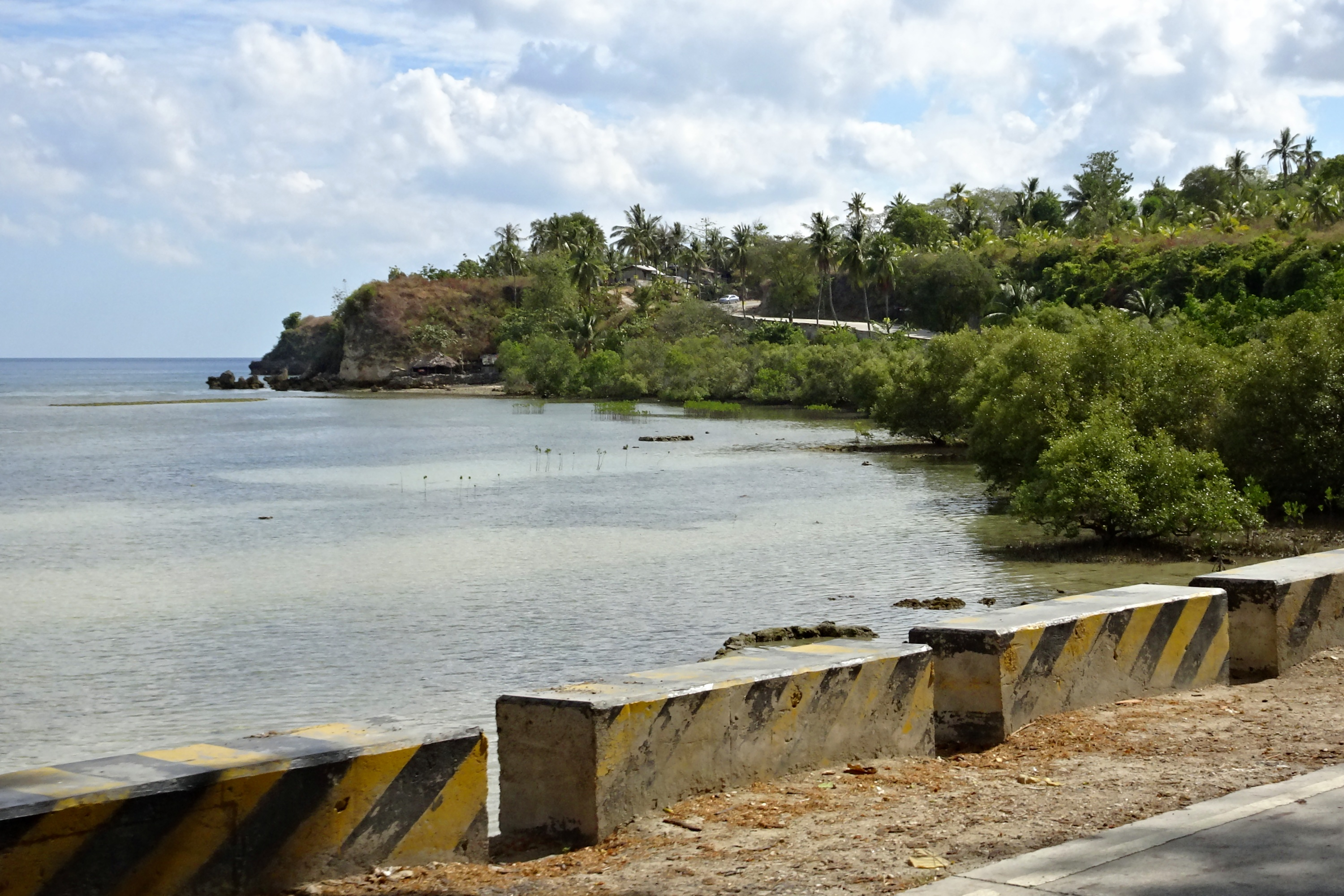 Barili, Cebu, Philippines